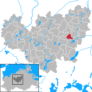 Thürkow in Mecklenburg-Vorpommern - District Güstrow